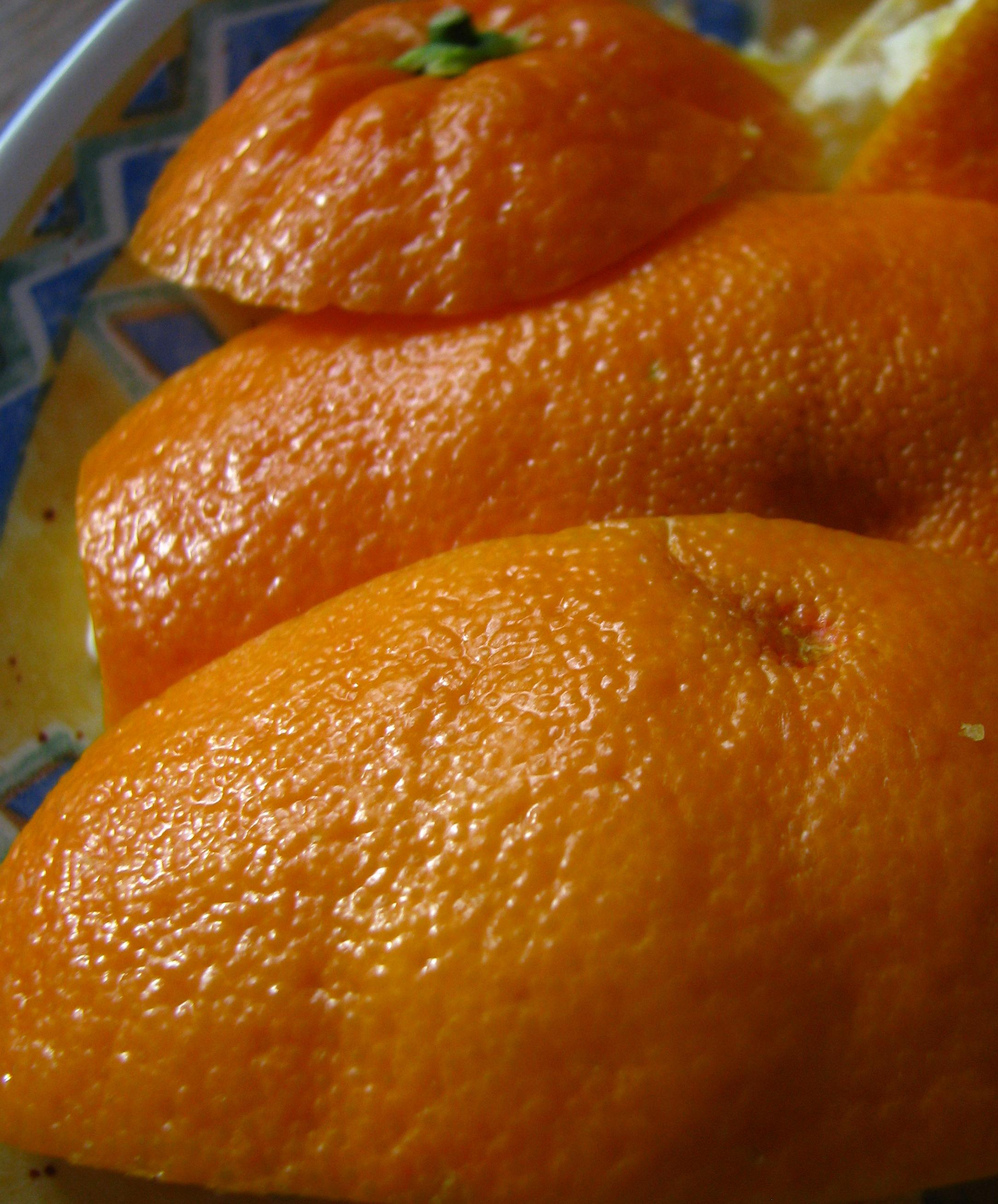 Erscheinungsbild von Orangenschale.